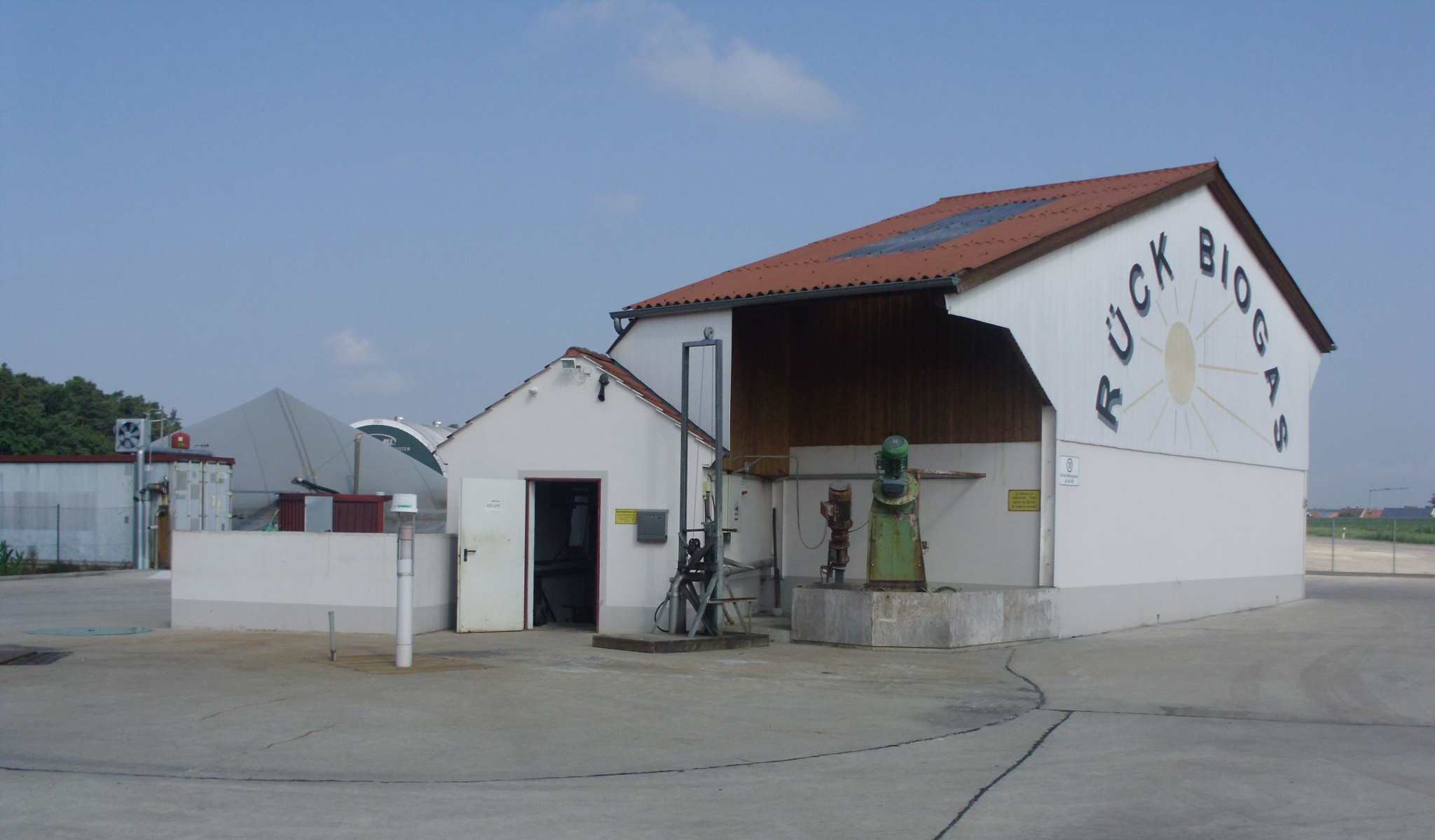 Gerbersdorf, Ortsteil von Merkendorf (Mittelfranken), Biogasanlage